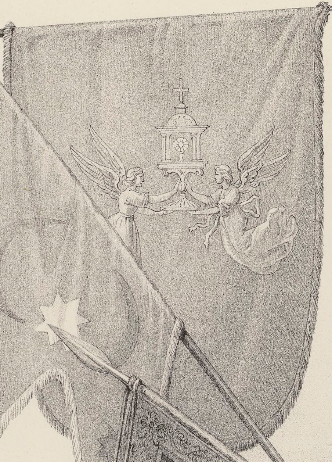 Bandeira de Galiza da batalla de Lepanto, conservada na Real Armaría de Madrid.